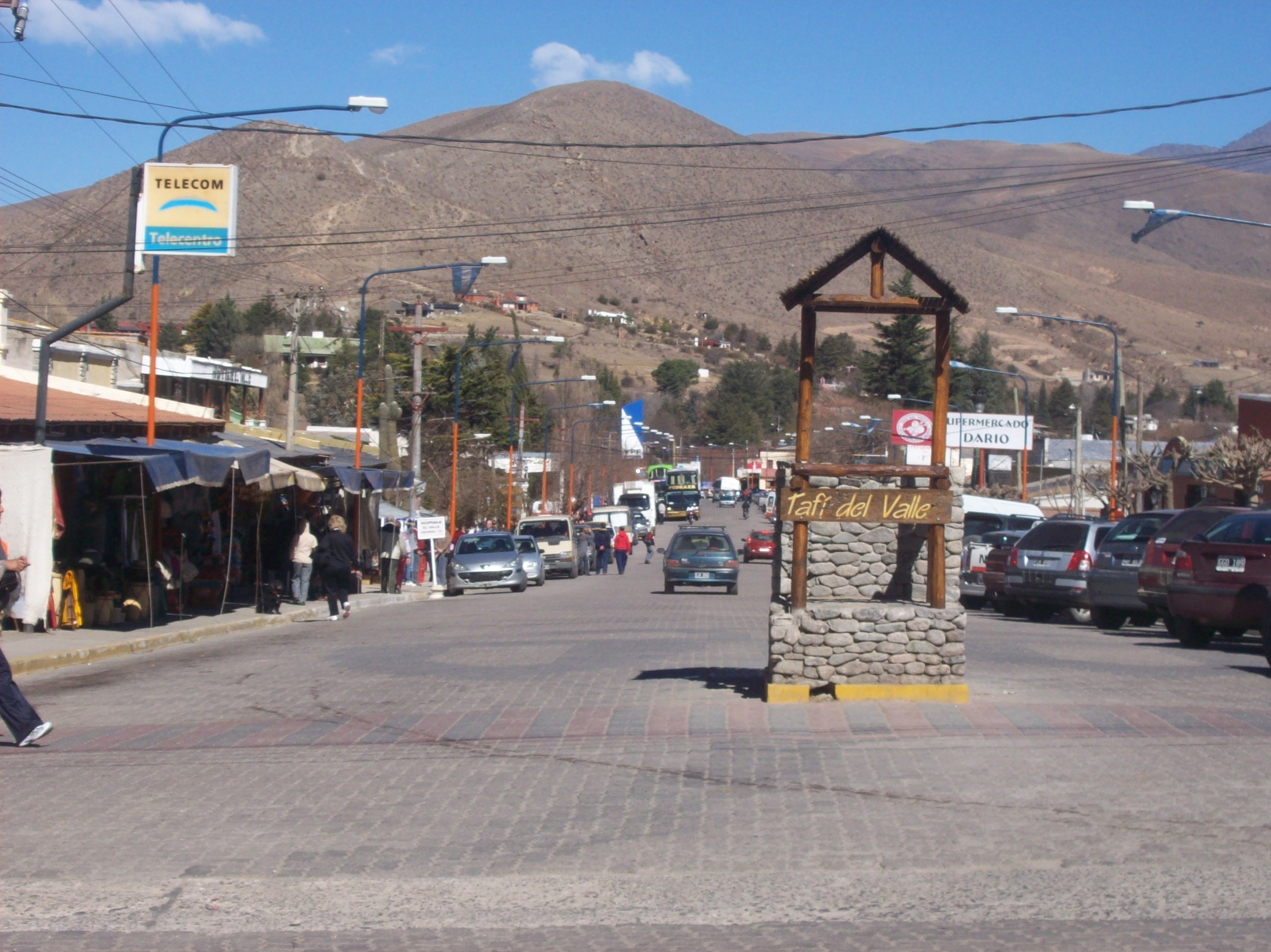 Calle céntrica de Tafí del Valle, departamento de Tafí del Valle, provincia de Tucumán, Argentina.